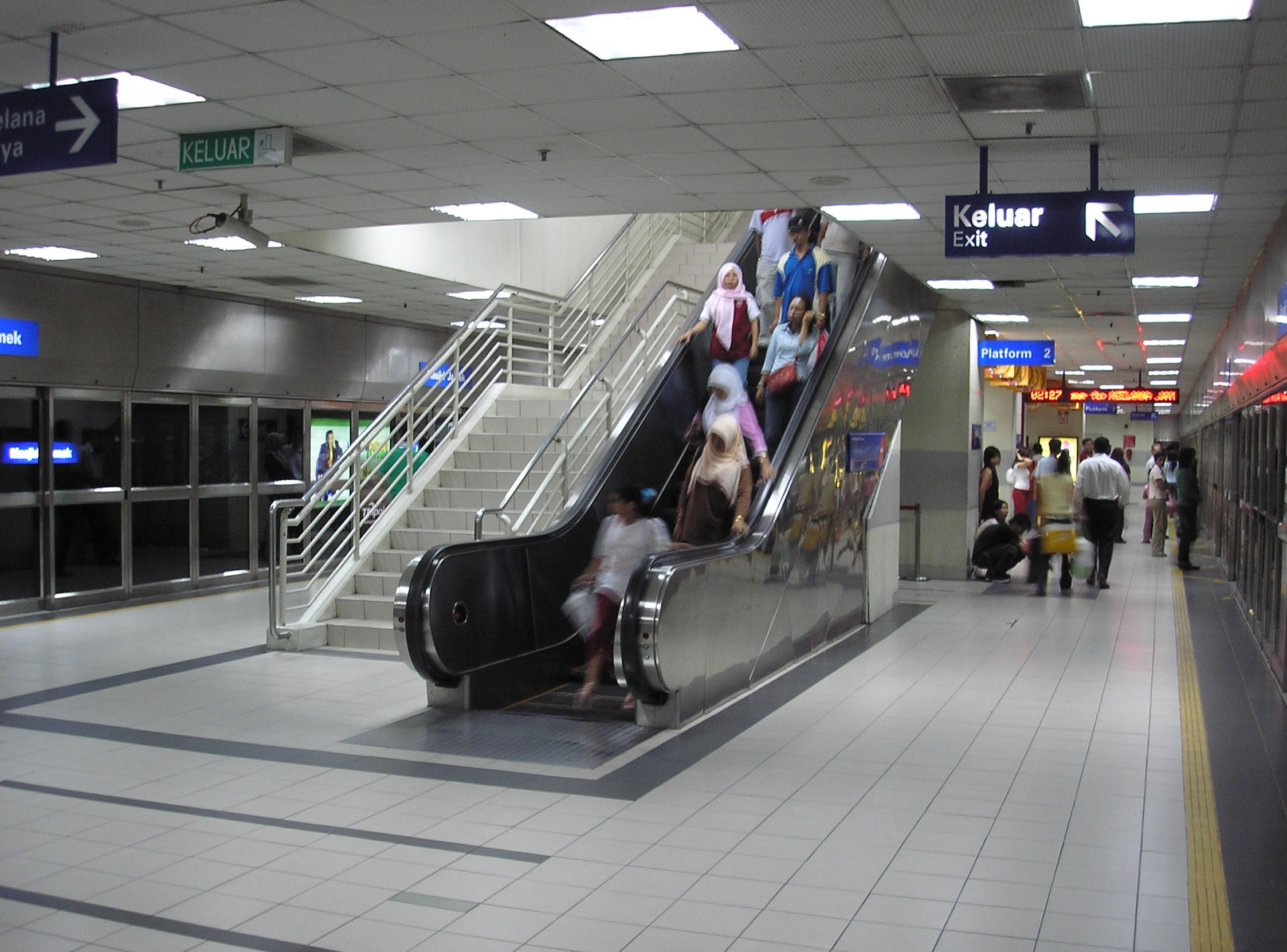 The Masjid Jamek LRT station (Kelana Jaya Line), Kuala Lumpur, Malaysia.